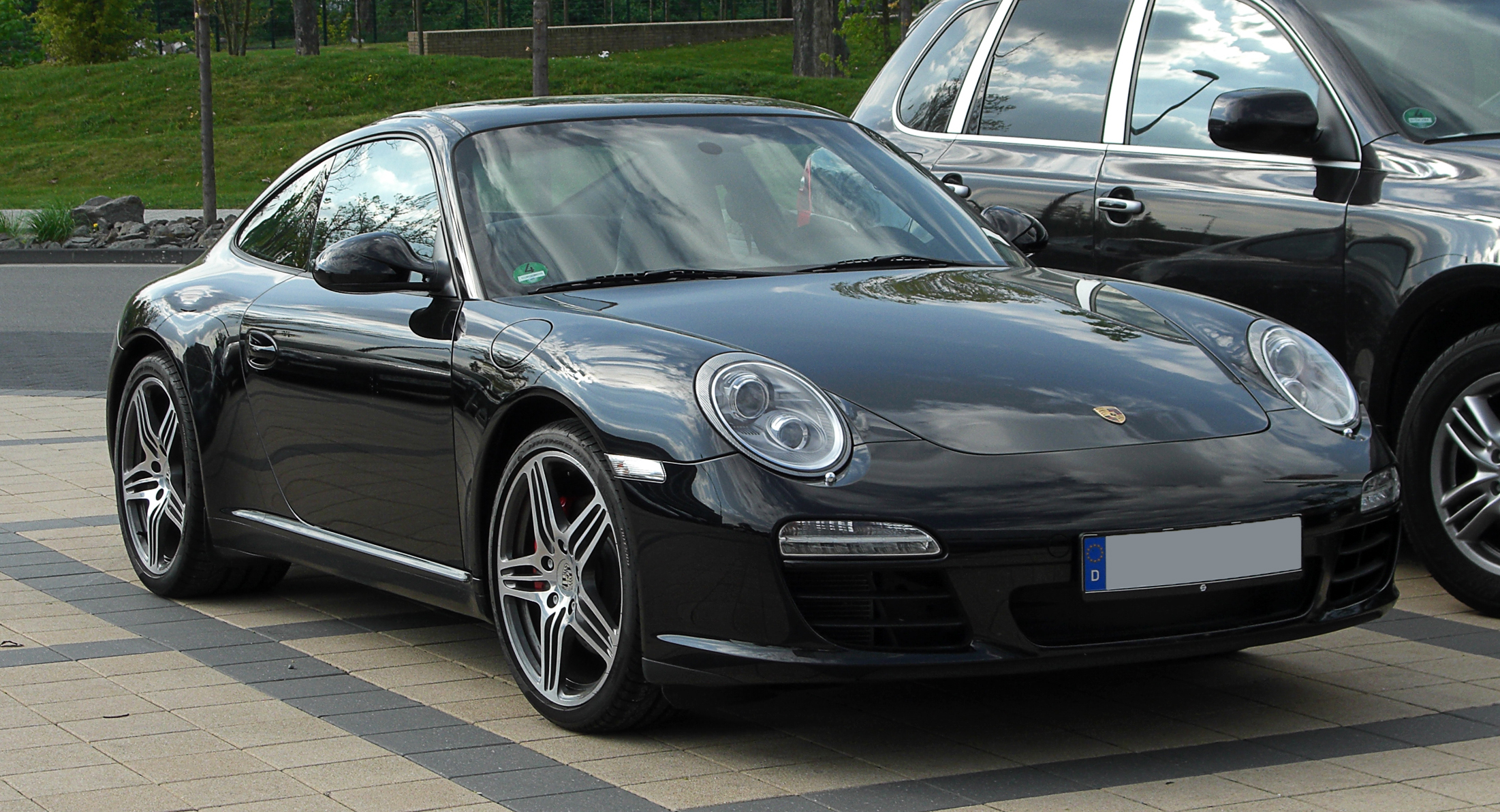 Porsche 911 Carrera S Coupé (997, Facelift)